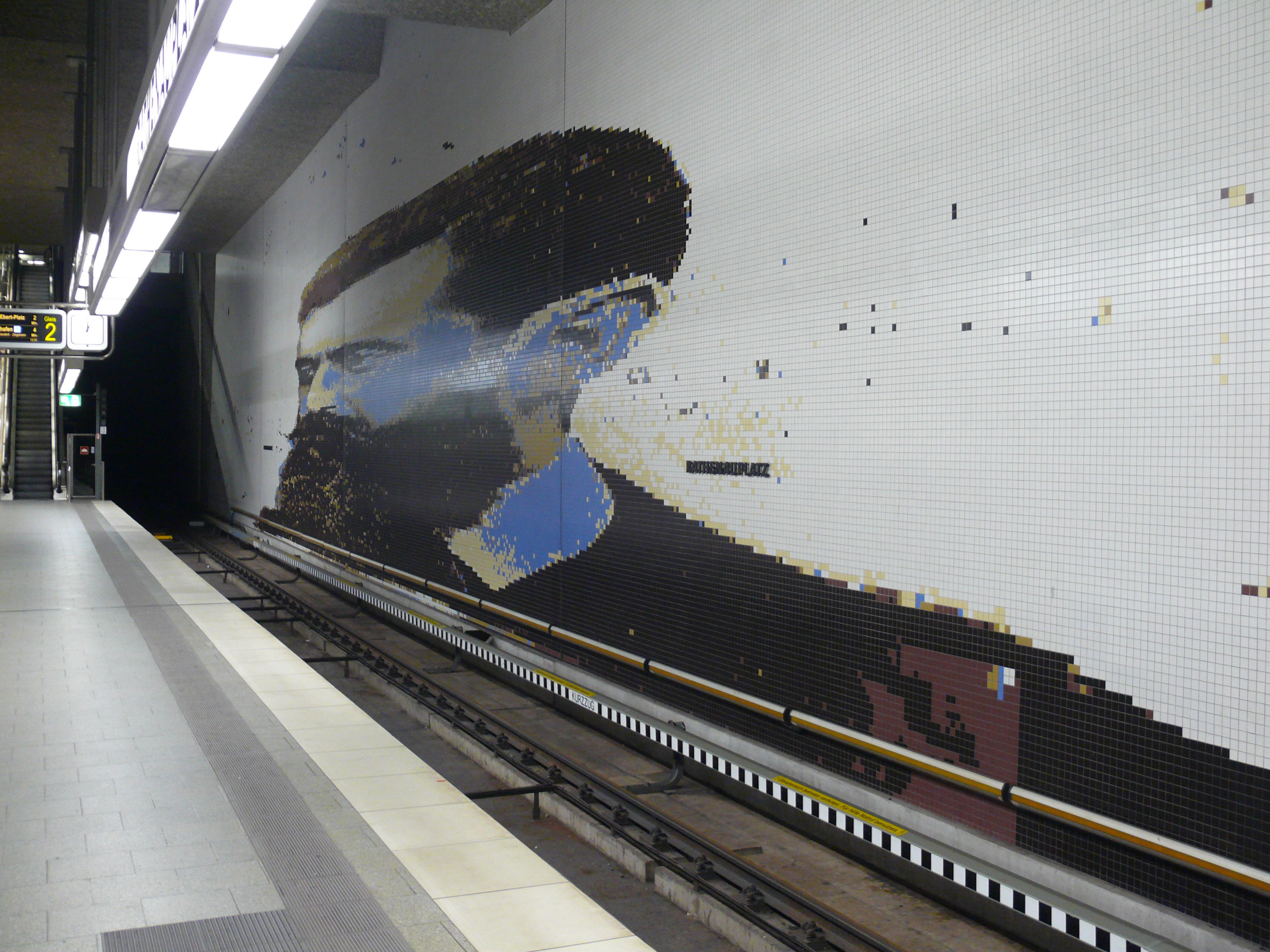 Mosaik von Theodor Herzl auf der Bahnsteigebene am U-Bahnhof Rathenauplatz in Nürnberg. Künstlerische Gestaltung des Großmosaiks 1990 von Gregor Hiltner